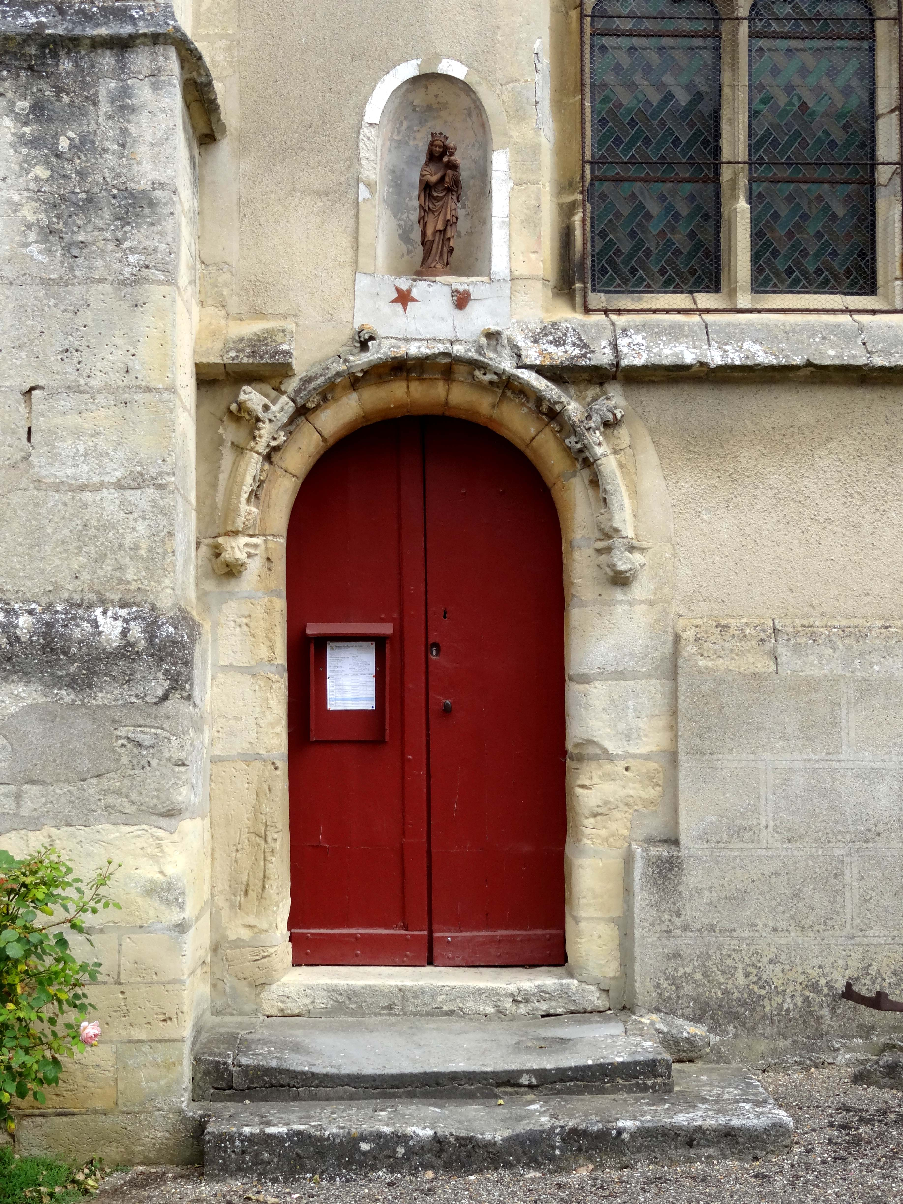 Église Saint-Germain de Boury-en-Vexin - voir titre.